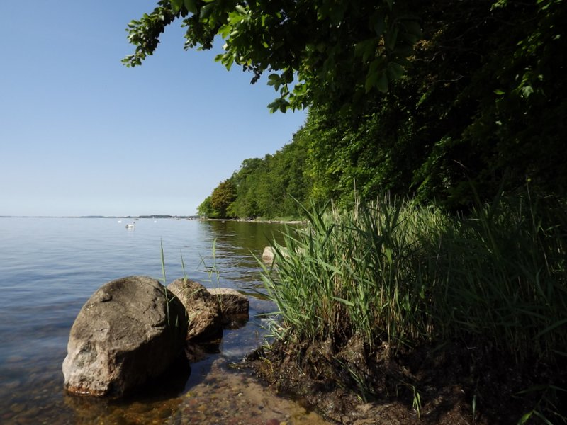 Naturschutzgebiet Goor-Muglitz auf Rügen, Ruhe und Erholung pur